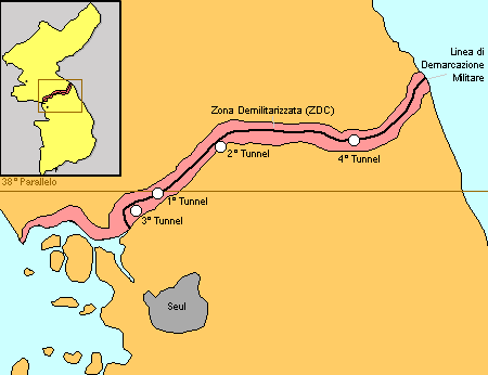 mappa della Zona demilitarizzata coreana (ZDC); è evidenziata la capitale della Corea del Sud (Seul).